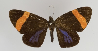 Hagnagora buckleyi